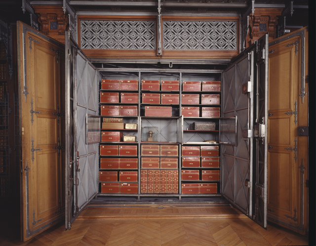 Située au centre des Grands dépôts des Archives nationales, l'armoire de fer renferme les documents les plus emblématiques de la Nation (testament de Louis XIV, constitutions de la République par exemple).